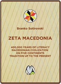 Корица на преводот од македоснки на англиски на книгата „Зета Македониа""